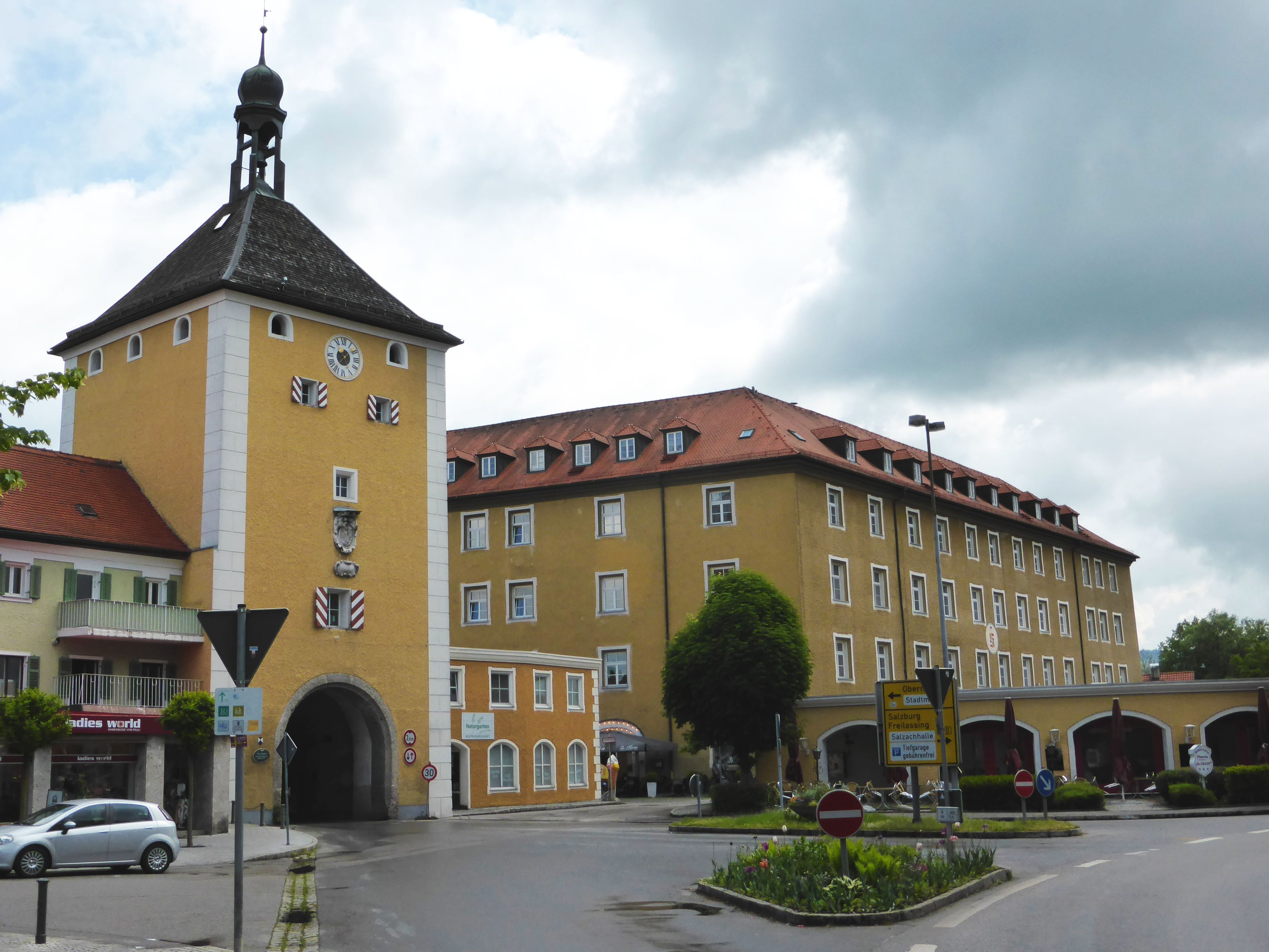 Schloss Laufen mit Salzburger Stadttor